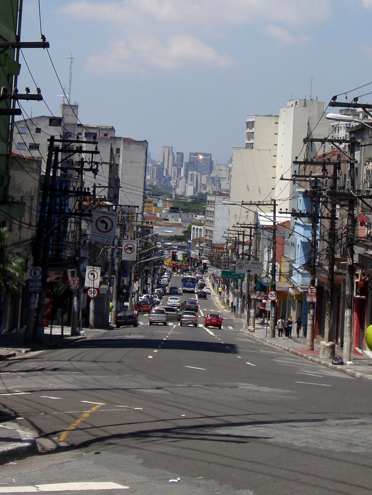 Foto da Rua Voluntários da Pátria em Santana, bairro da cidade de São Paulo